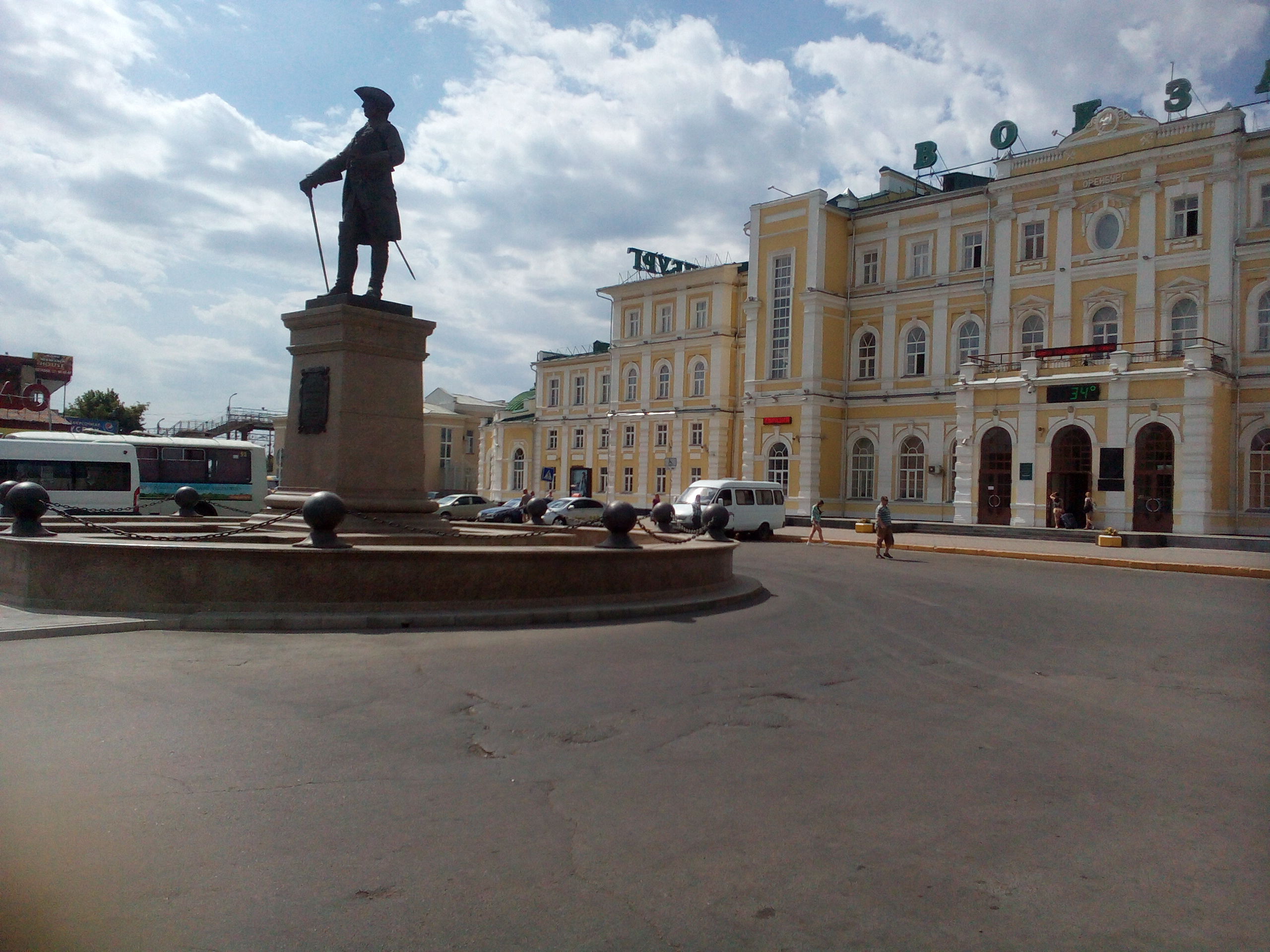 Вокзал железнодорожный: площадь Привокзальная, Оренбург, Оренбургская область